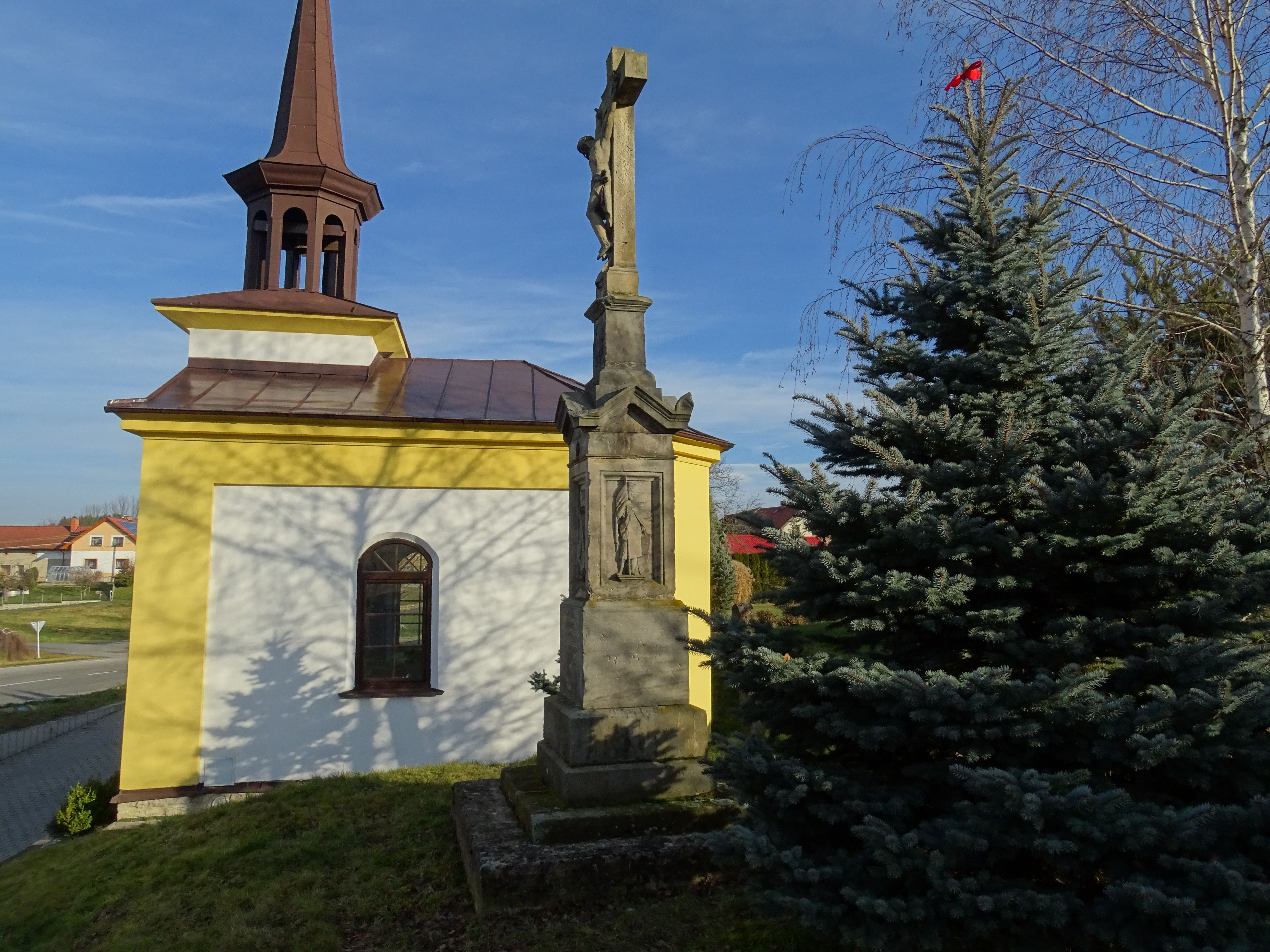 historické památky obce